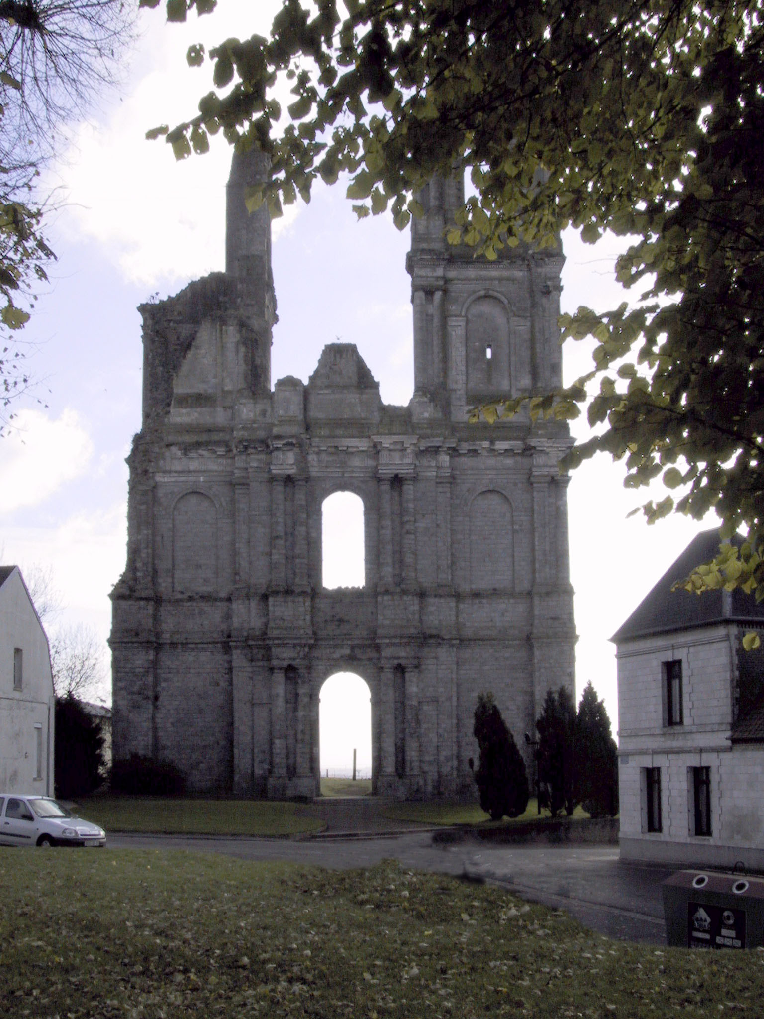 Photo personnelle domaine public